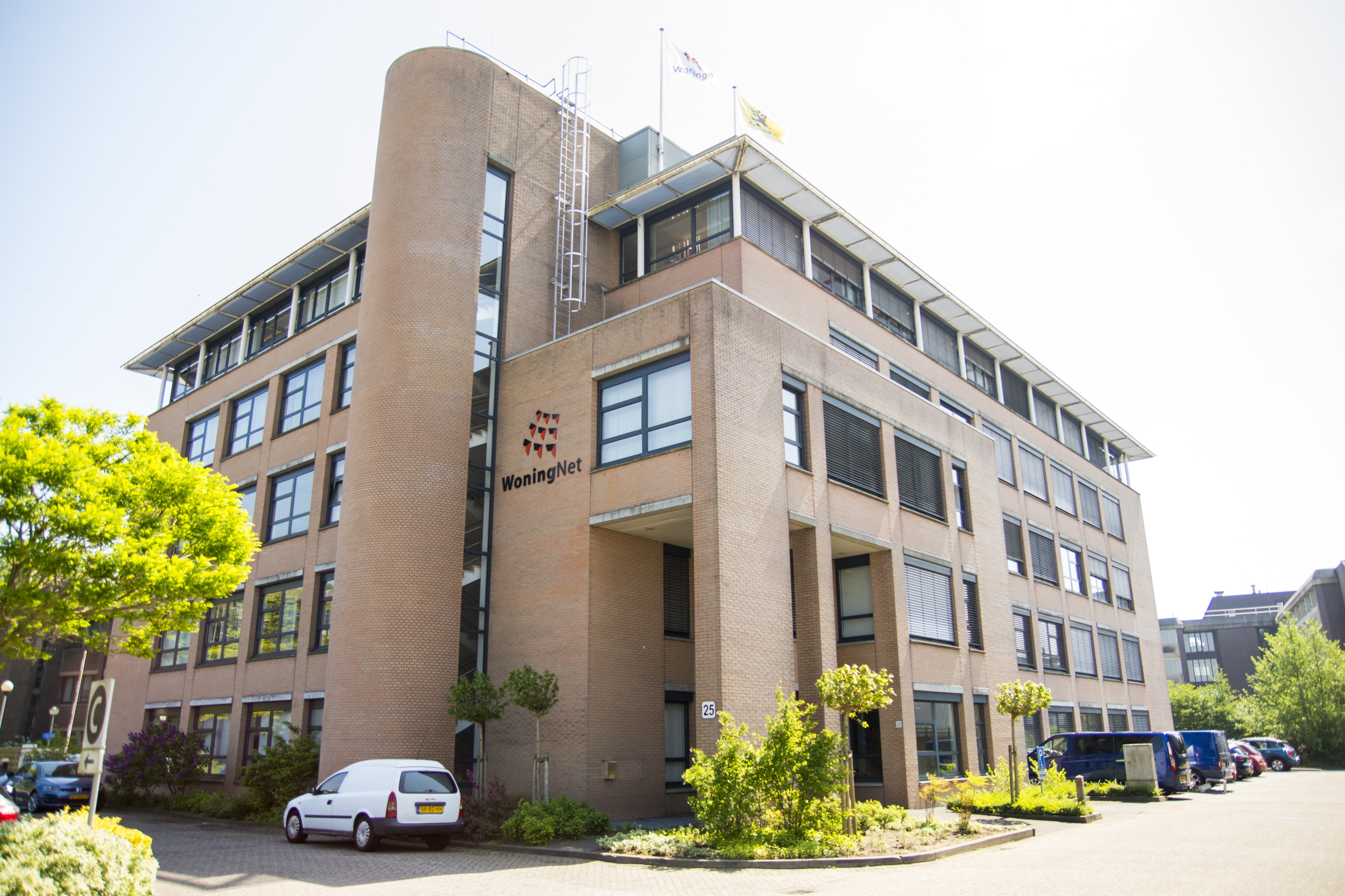 WoningNet Van Houten Industriepark 25 1381 MZ Weesp